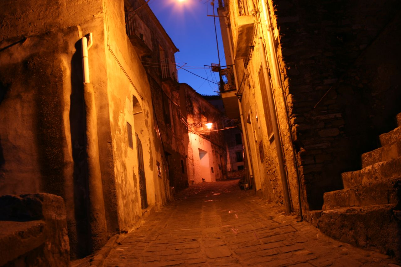 viottoli del centro storico di Tursi